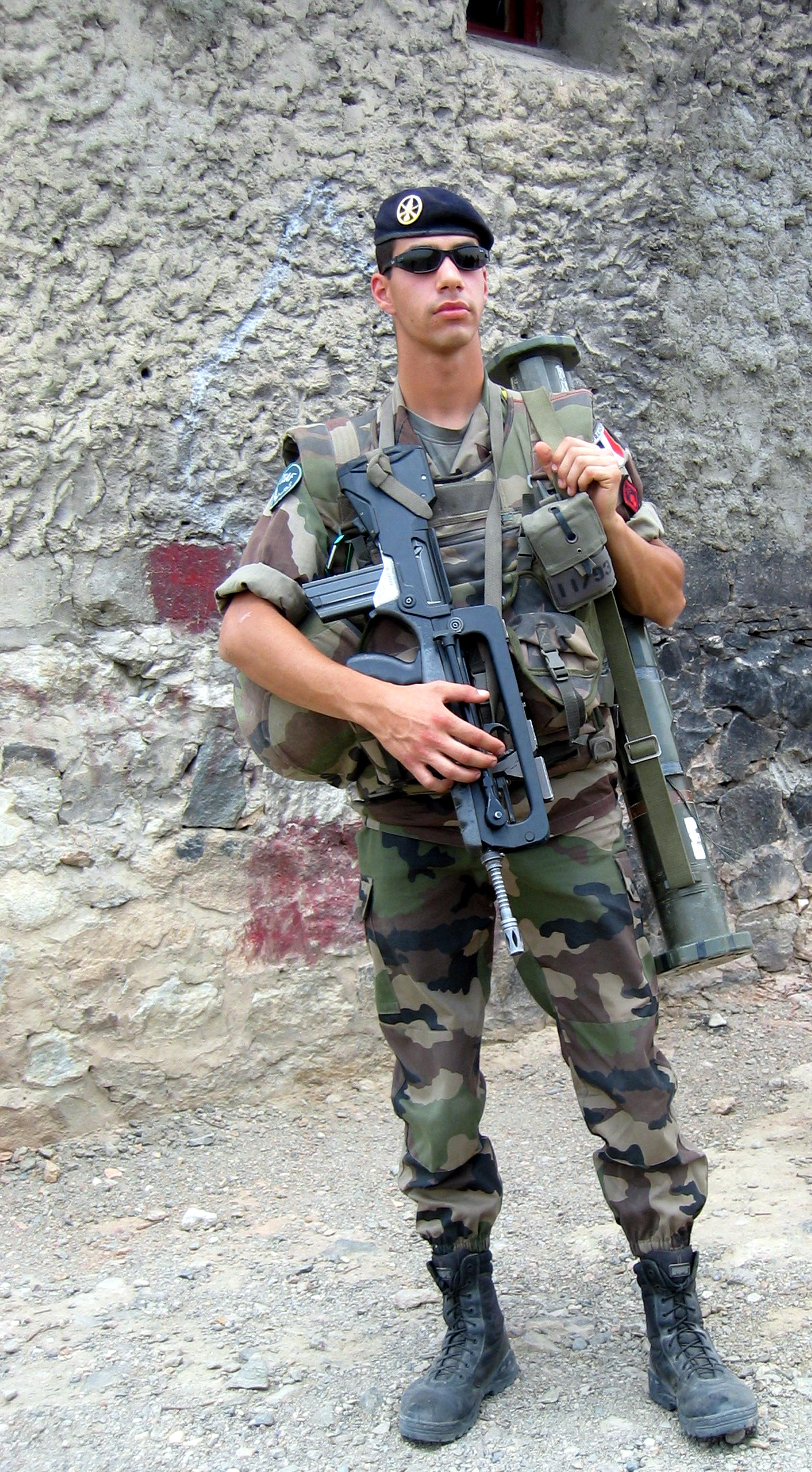 Ein französischer Soldat des 35. gepanzerten Infanterieregiments während des Einsatzes in Kabul, Afghanistan